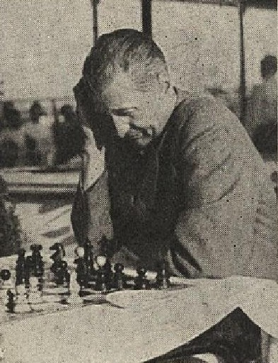 Otokar Kruliš-Randa (1890-1958), český průmyslník, vzděláním stavební inženýr